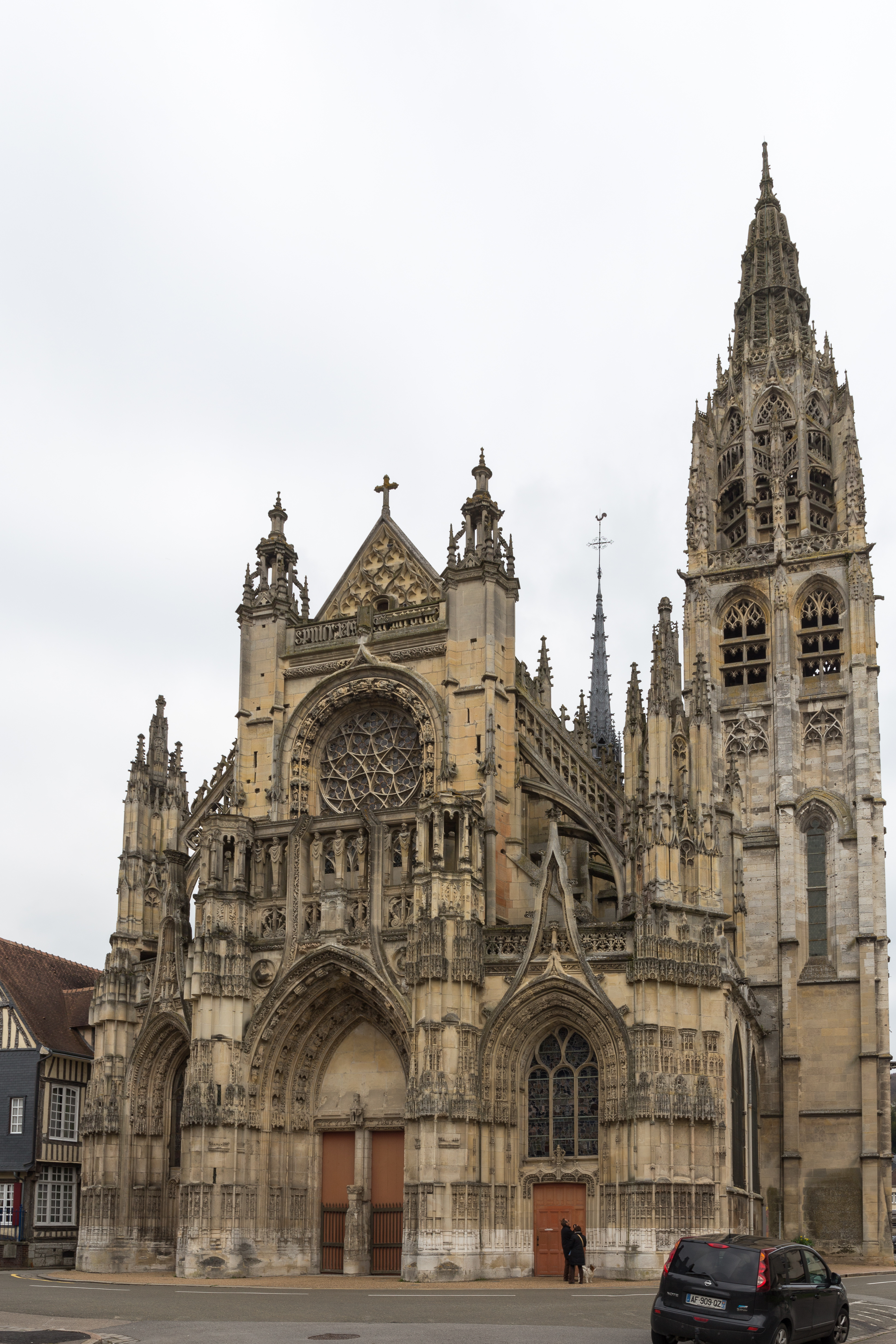 Église Notre-Dame de Caudebec-en-Caux.